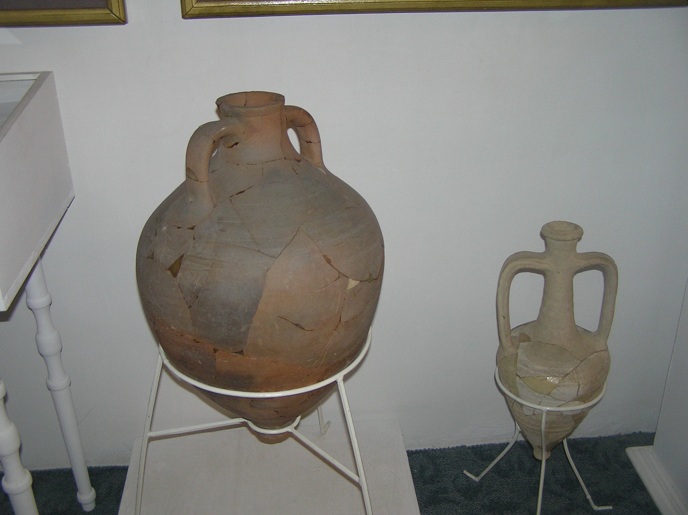 Измаильский музей Придунавья